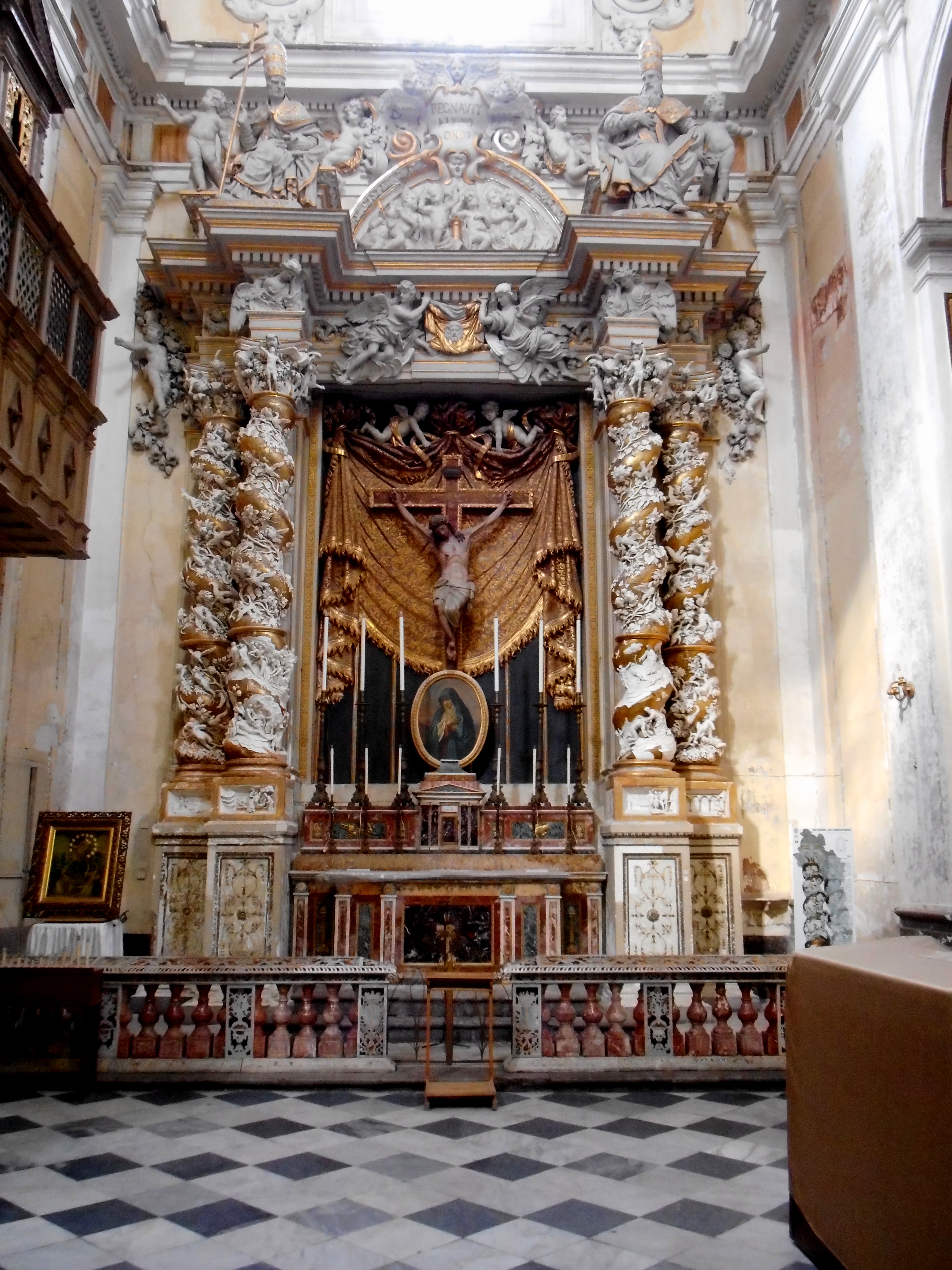 Cappella del Santissimo Crocifisso nel transetto destro della chiesa del Carmine Maggiore